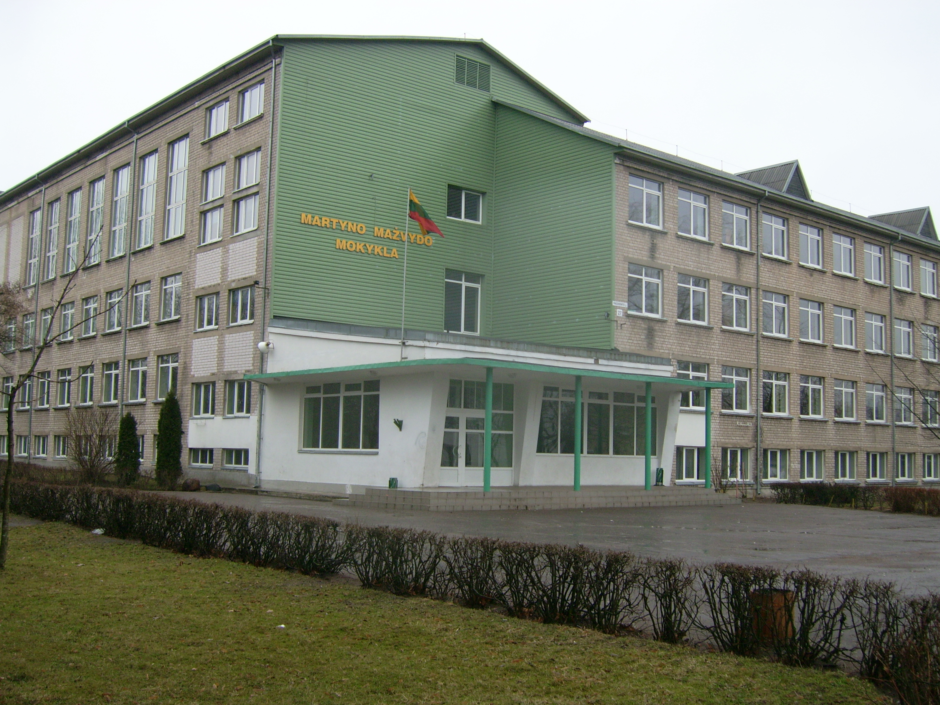 Tauragės Martyno Mažvydo mokykla